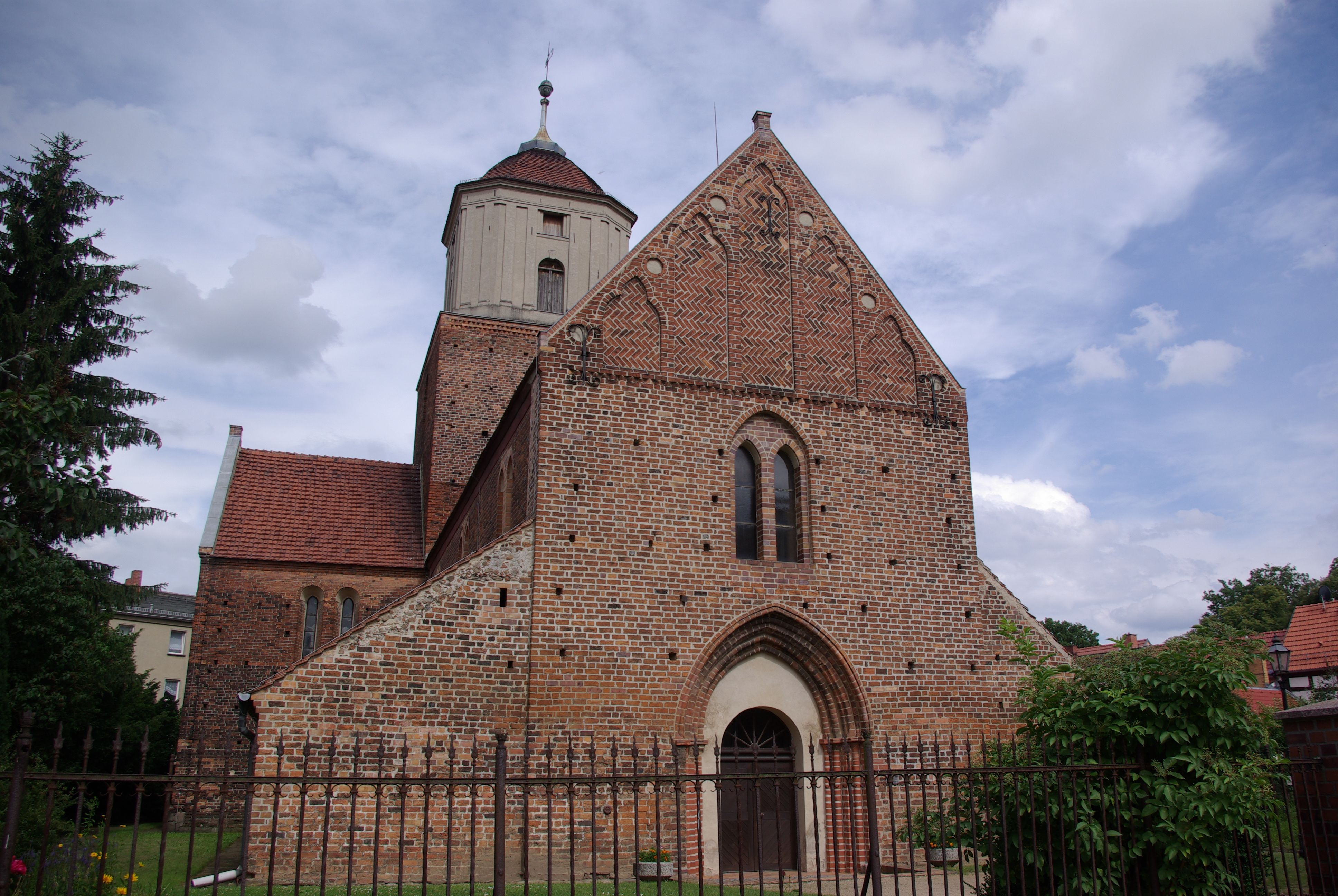 Treuenbrietzen in Brandenburg. Die Kirche Sankt Nicolai ist katholische Kirche in Treuenbrietzen. Die Kirche steht unter Denkmalschutz.